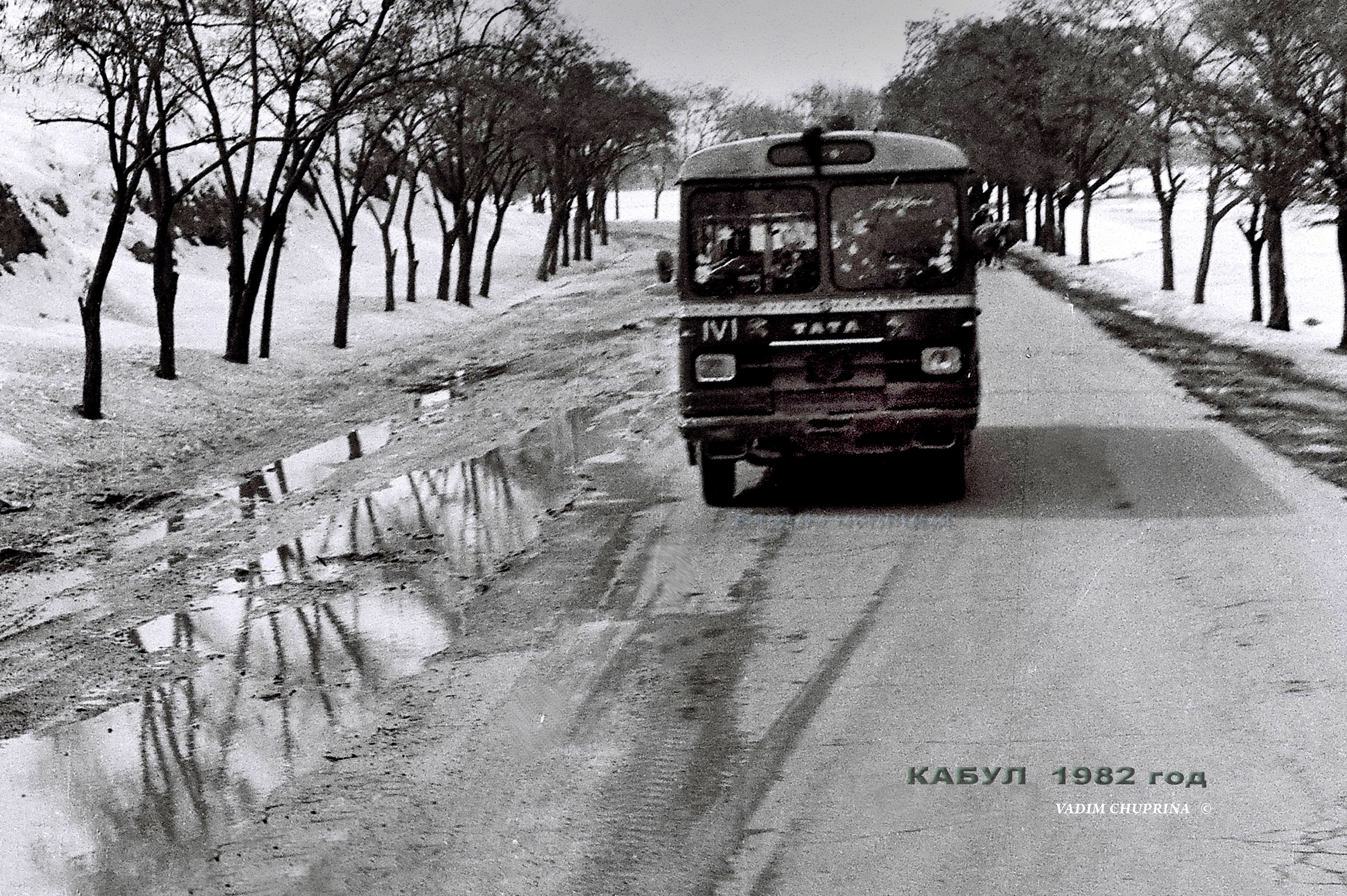 Кабул 1982 год